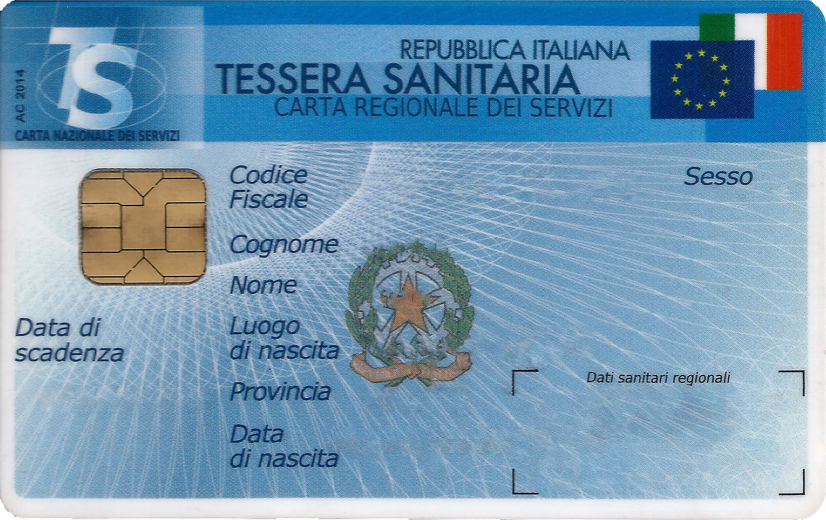 Fronte della Carta nazionale dei servizi.